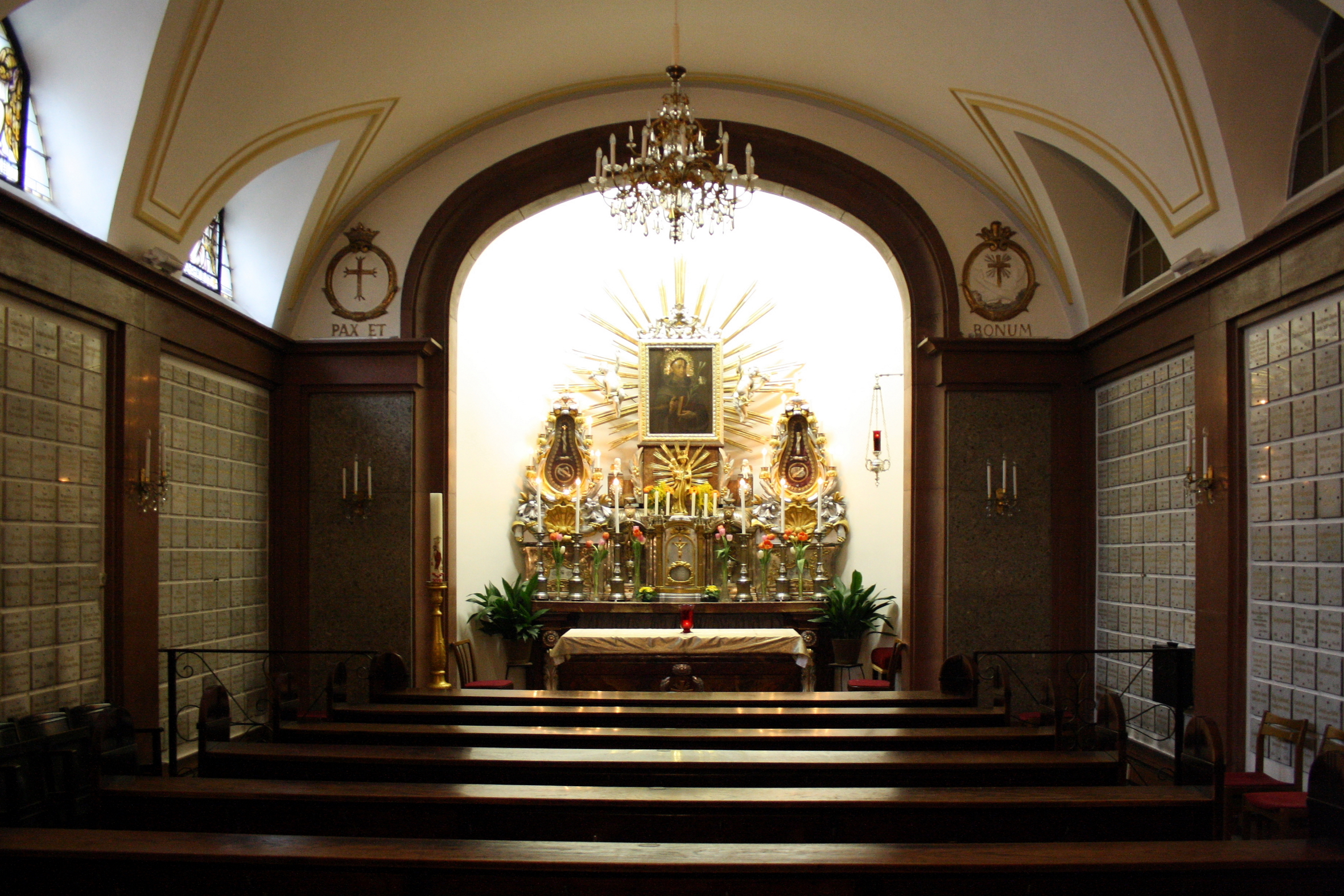 Die Antoniuskapelle an der Südostecke des Kreuzganges des Wiener Minoritenklosters.